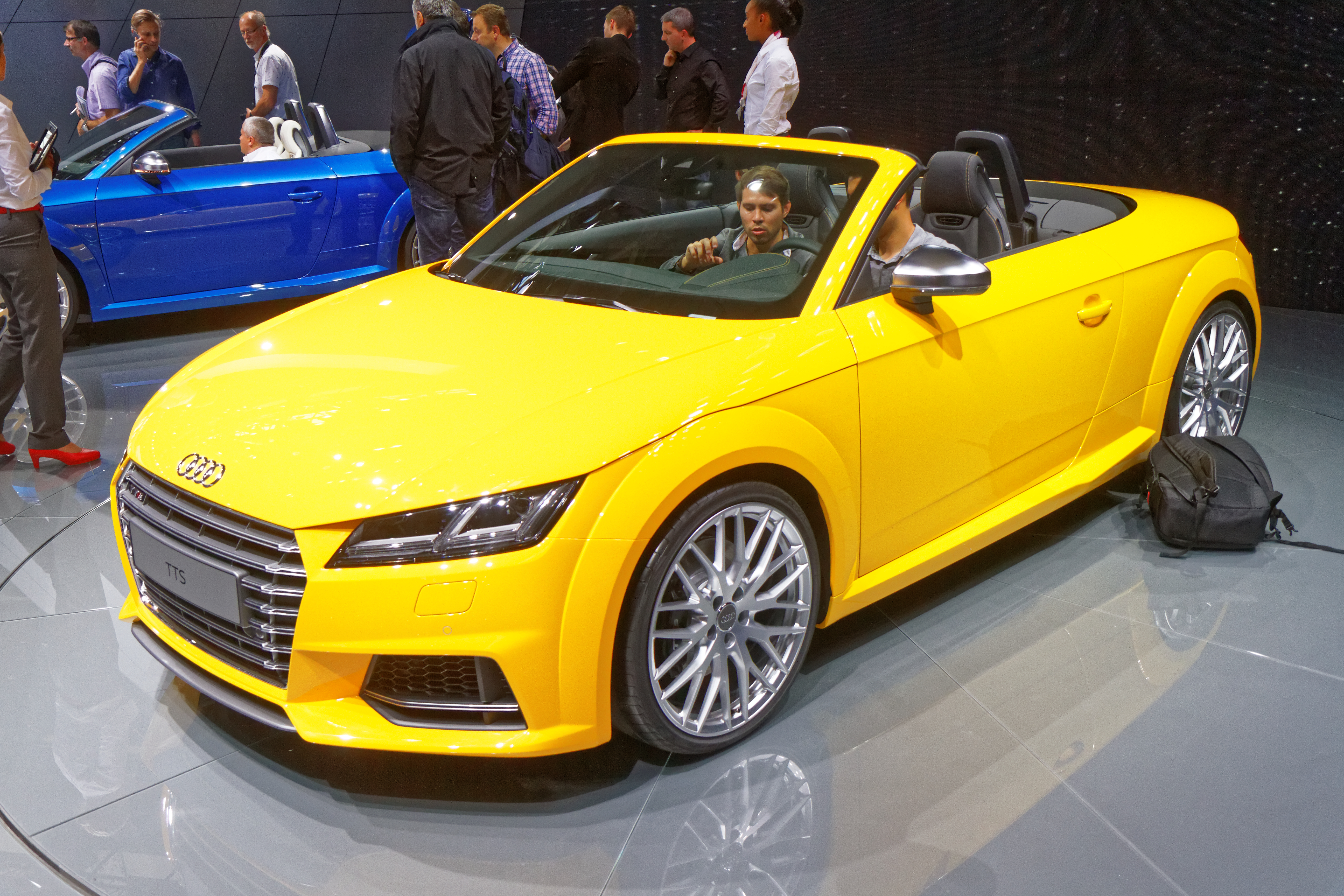 Une Audi TTS présentée lors du mondial de l'automobile de Paris 2014.